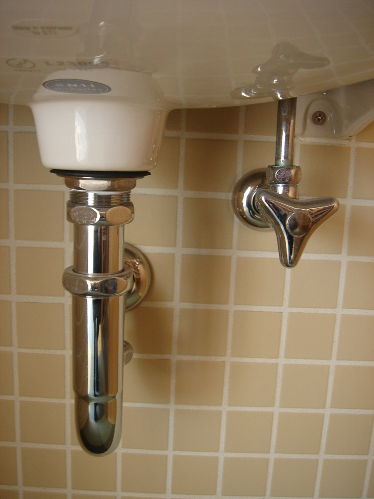 Sink plumbing